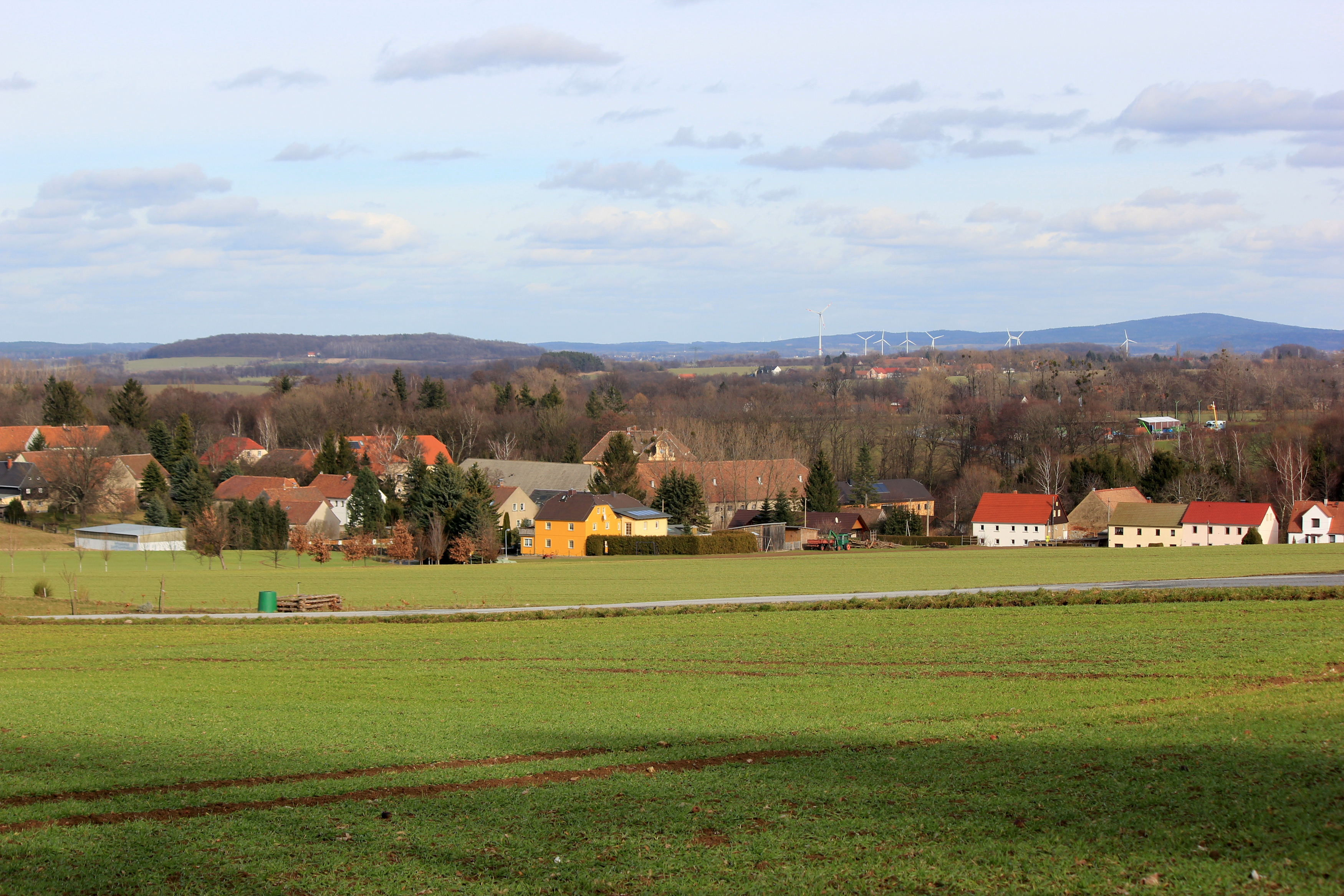 Hornjoserbsce: Napohlad Koporc z Bukec.